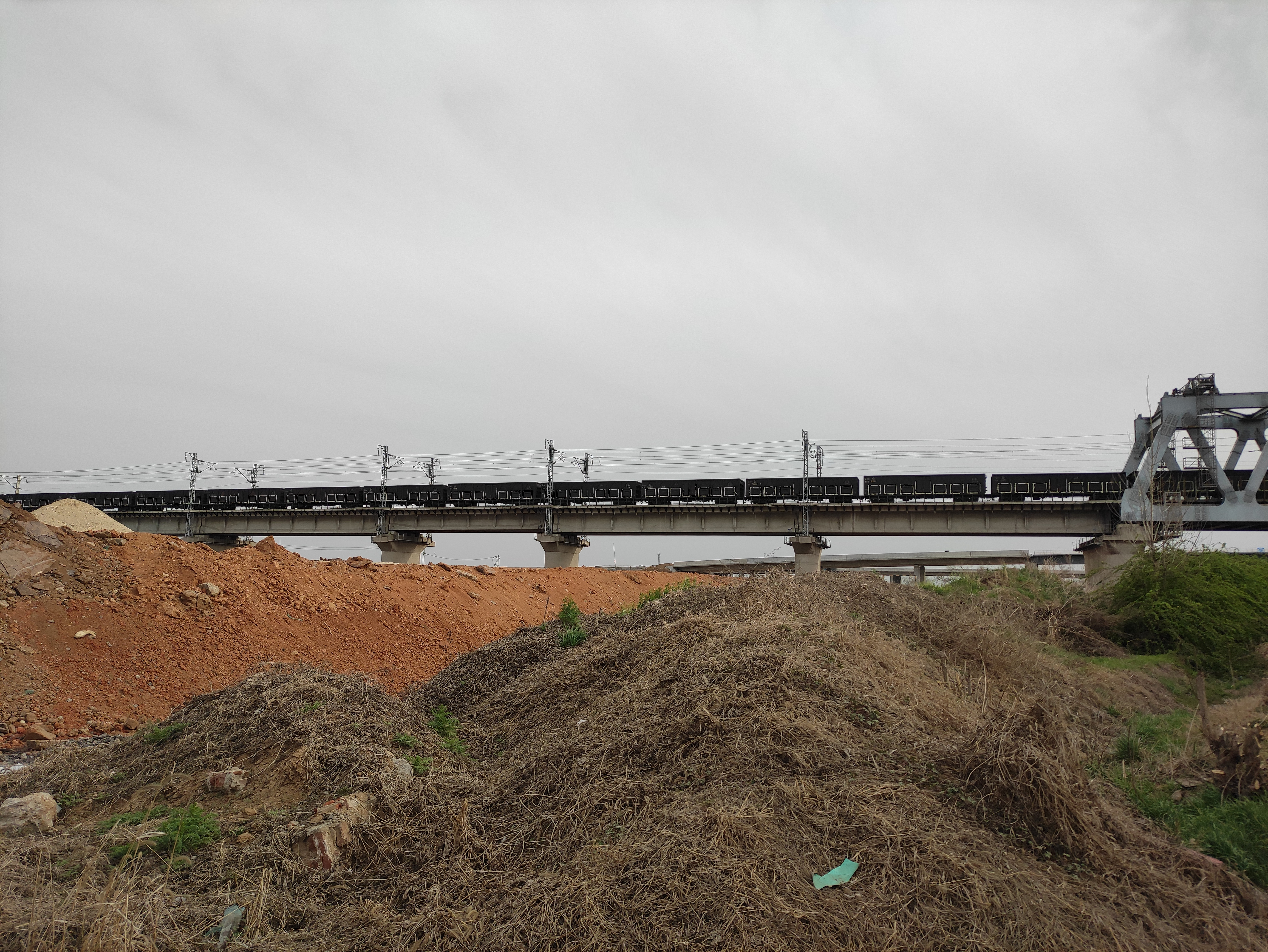 瓦日铁路州城街道段